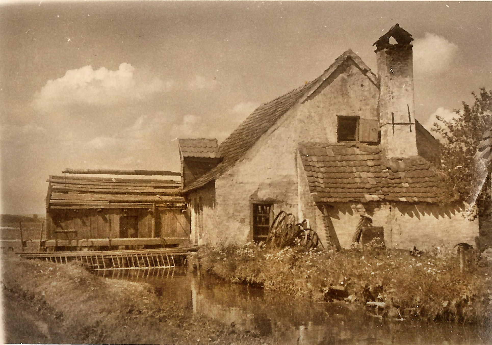 Die alte Hammerschmiede